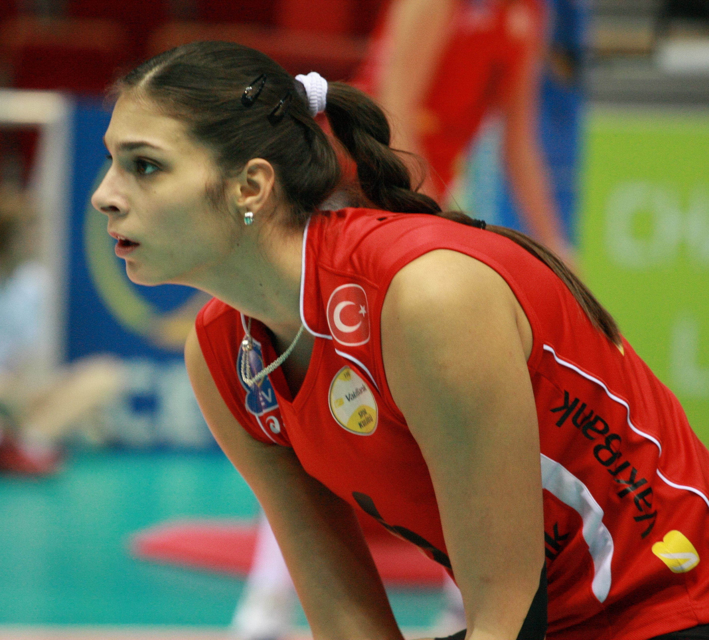 Jovana Brakocevic